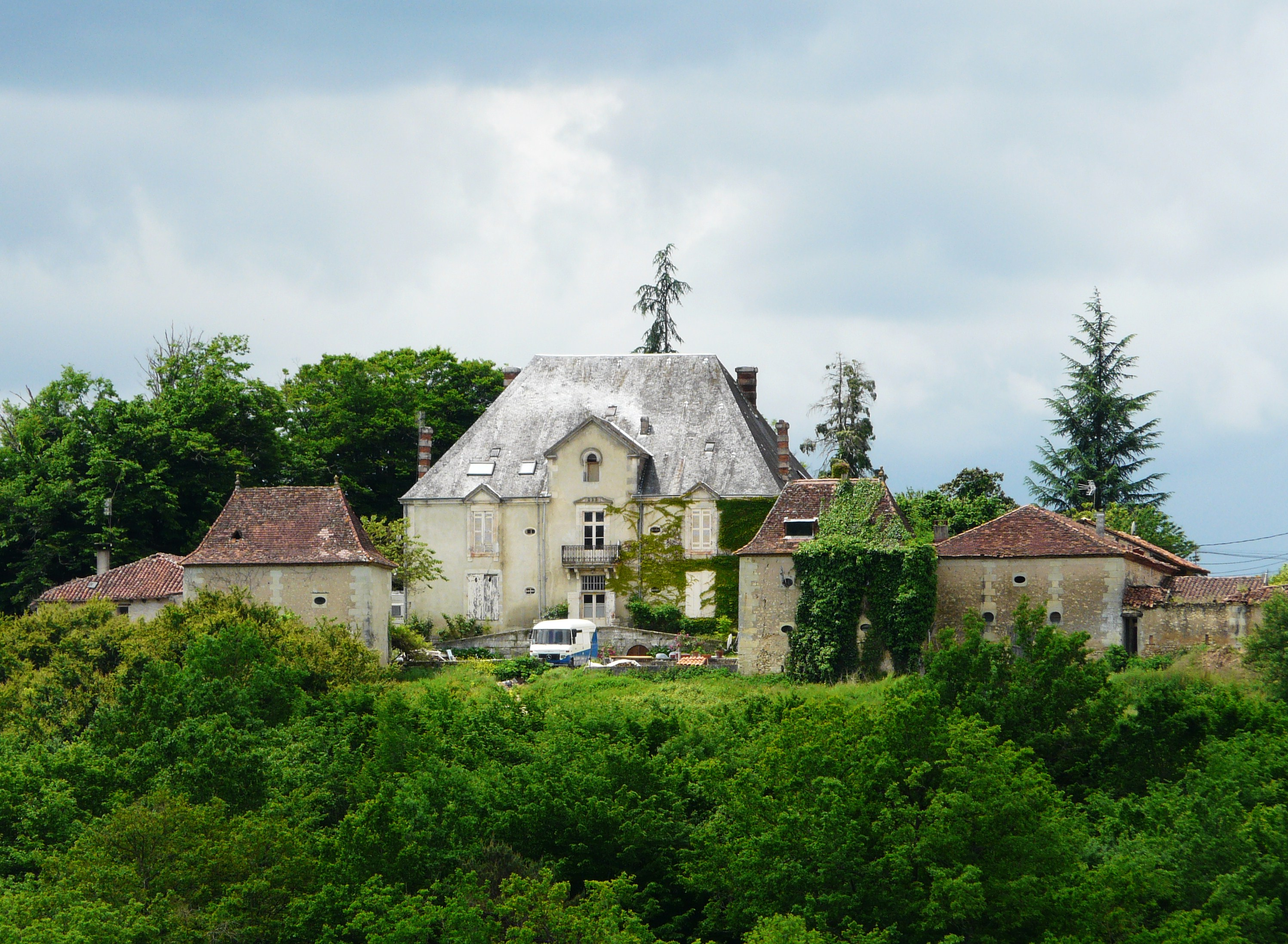 Château des Brunies à La Chapelle-Gonaguet